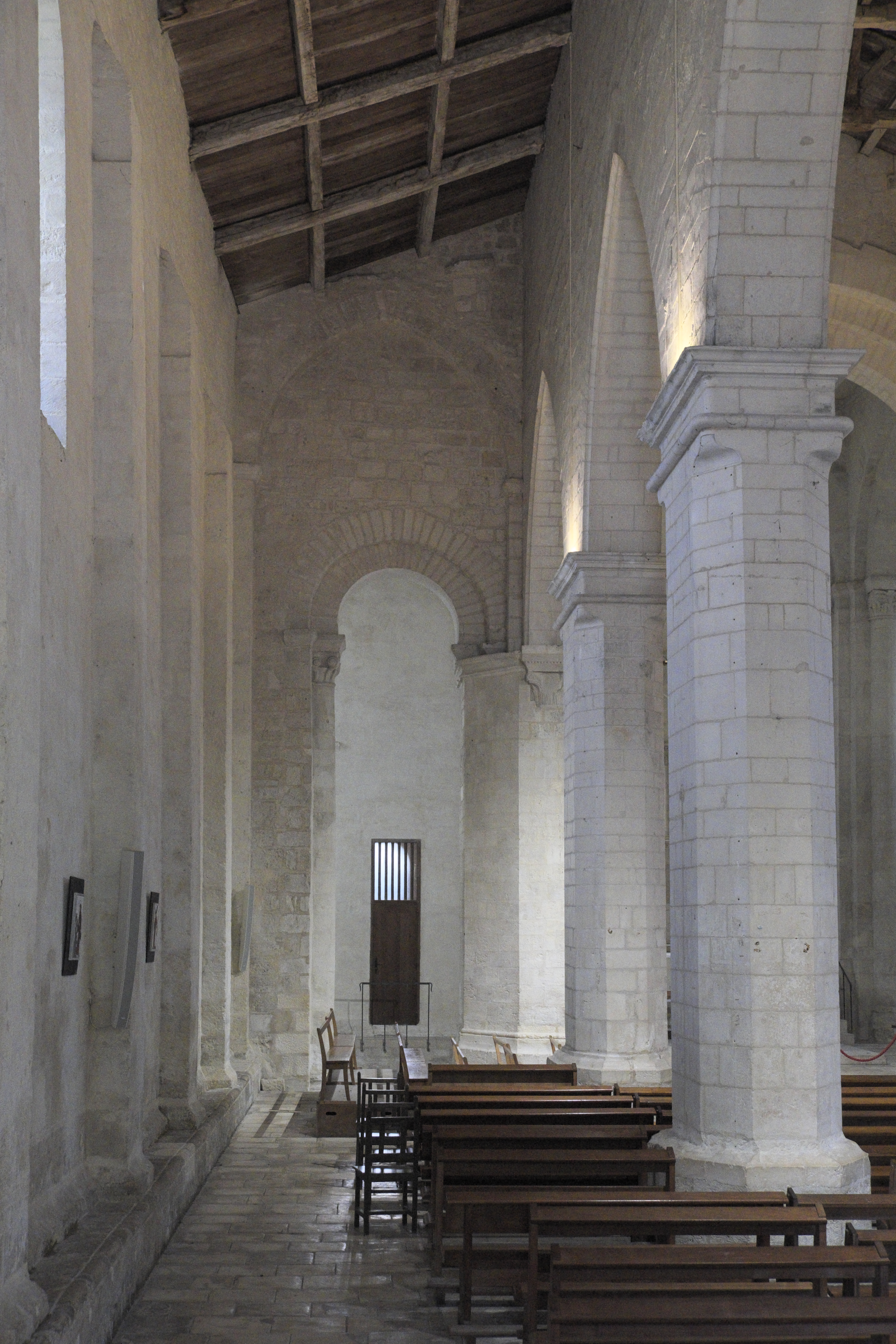 Katholische Kirche Notre-Dame-de-l’Assomption in Surgères im Département Charente-Maritime (Nouvelle-Aquitaine/Frankreich), Innenraum